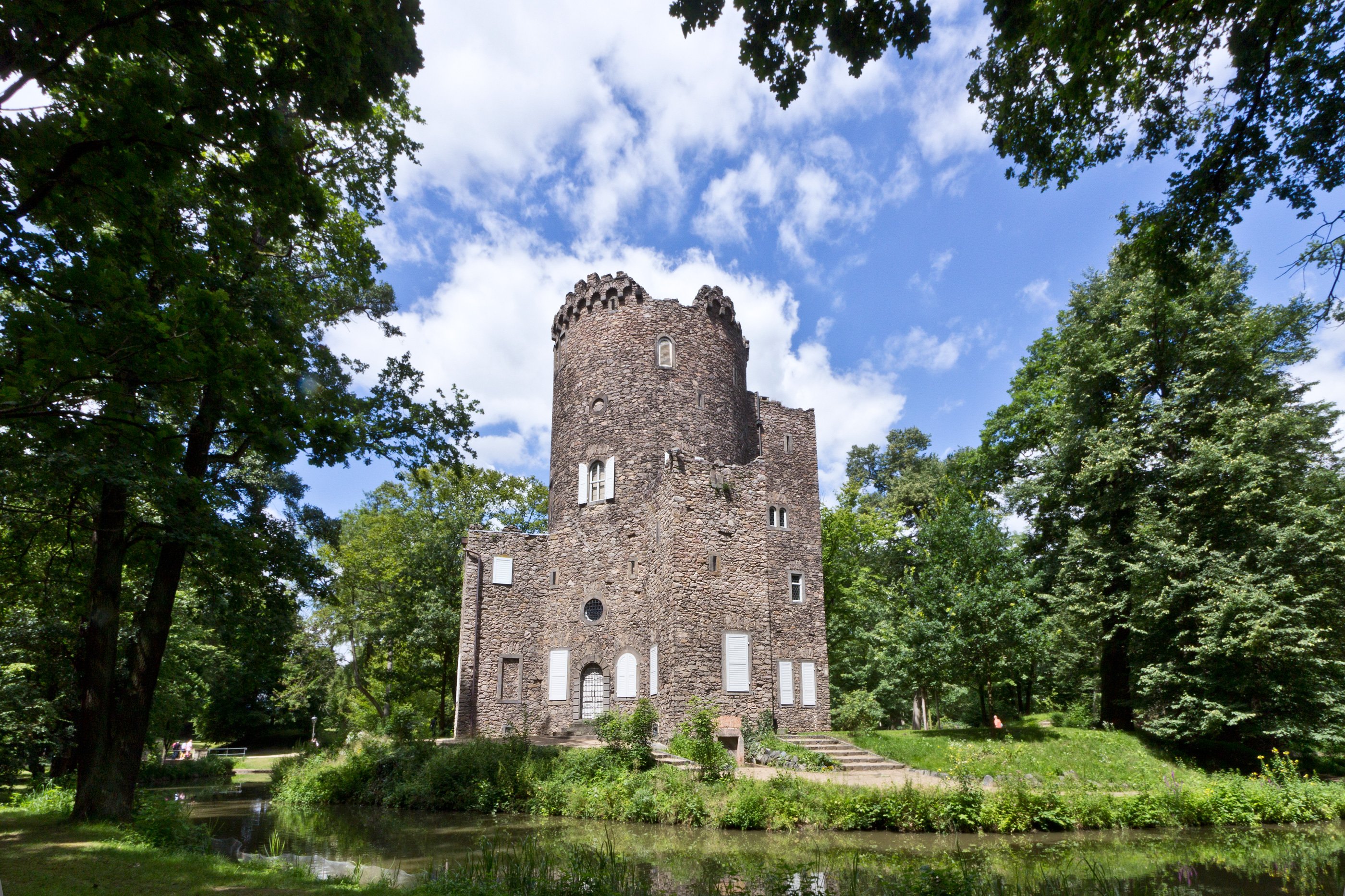 Die künstliche Burgruine in der Parkanlage Wilhelmsbad in Hanau.